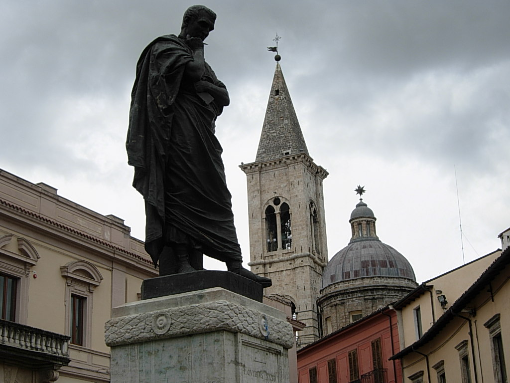 Cupola e campanile visti da Piazza Ovidio - Complesso SS. Annunziata in Sulmona (AQ) Foto personale